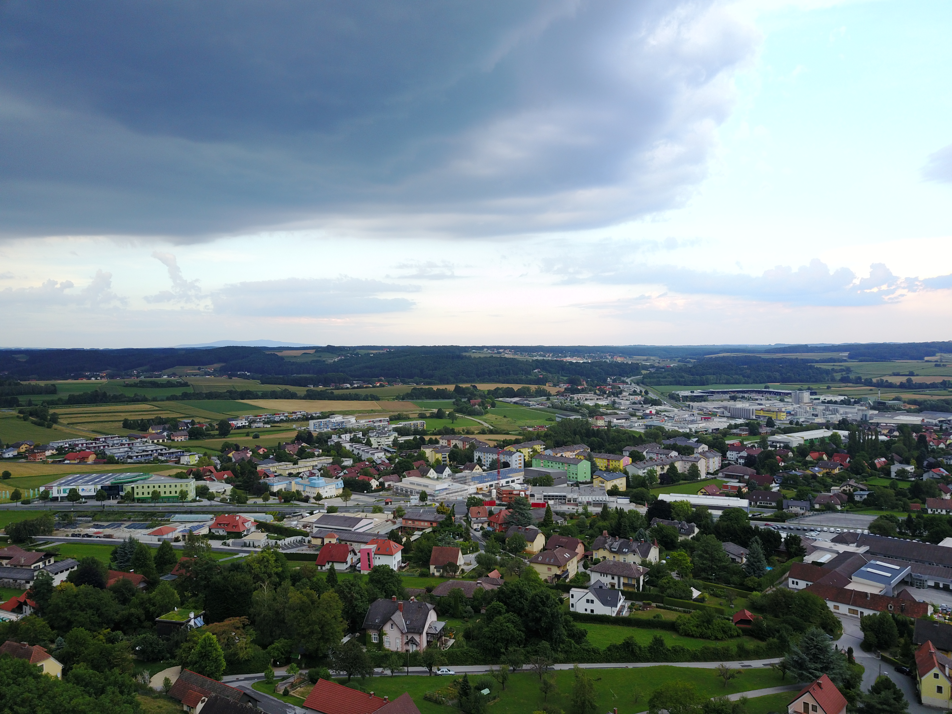 Blick über Ost-Hartberg